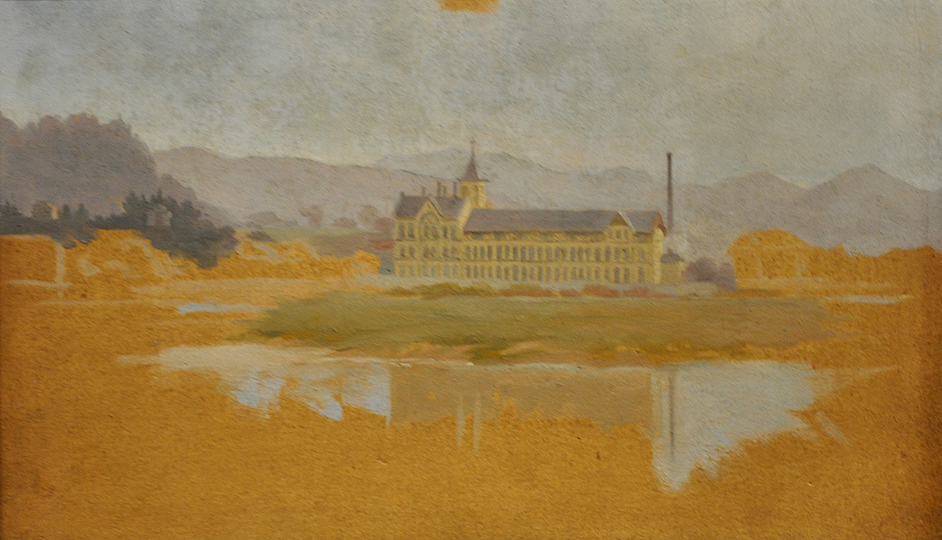 Gründerzeitliches Fabrikgebäude der Fa. Wilhelm Benger & Söhne, Öl auf Karton, um 1890 (zur Geschichte des Unternehmens u. a. in Vorarlberg siehe vol.at) Bregenz, Vorarlberg Museum Vorarlberg museum Native namevorarlberg museumLocationBregenz, Vorarlberg, AustriaCoordinates47° 30′ 15.84″ N, 9° 44′ 48.01″ E Established1857Web pageVorarlberg Museum websiteAuthority control : Q2533480 VIAF: 124091336 ISNI: 0000 0001 2242 622X LCCN: n50051186 GND: 18871-2 SUDOC: 030717523 WorldCat institution QS:P195,Q2533480